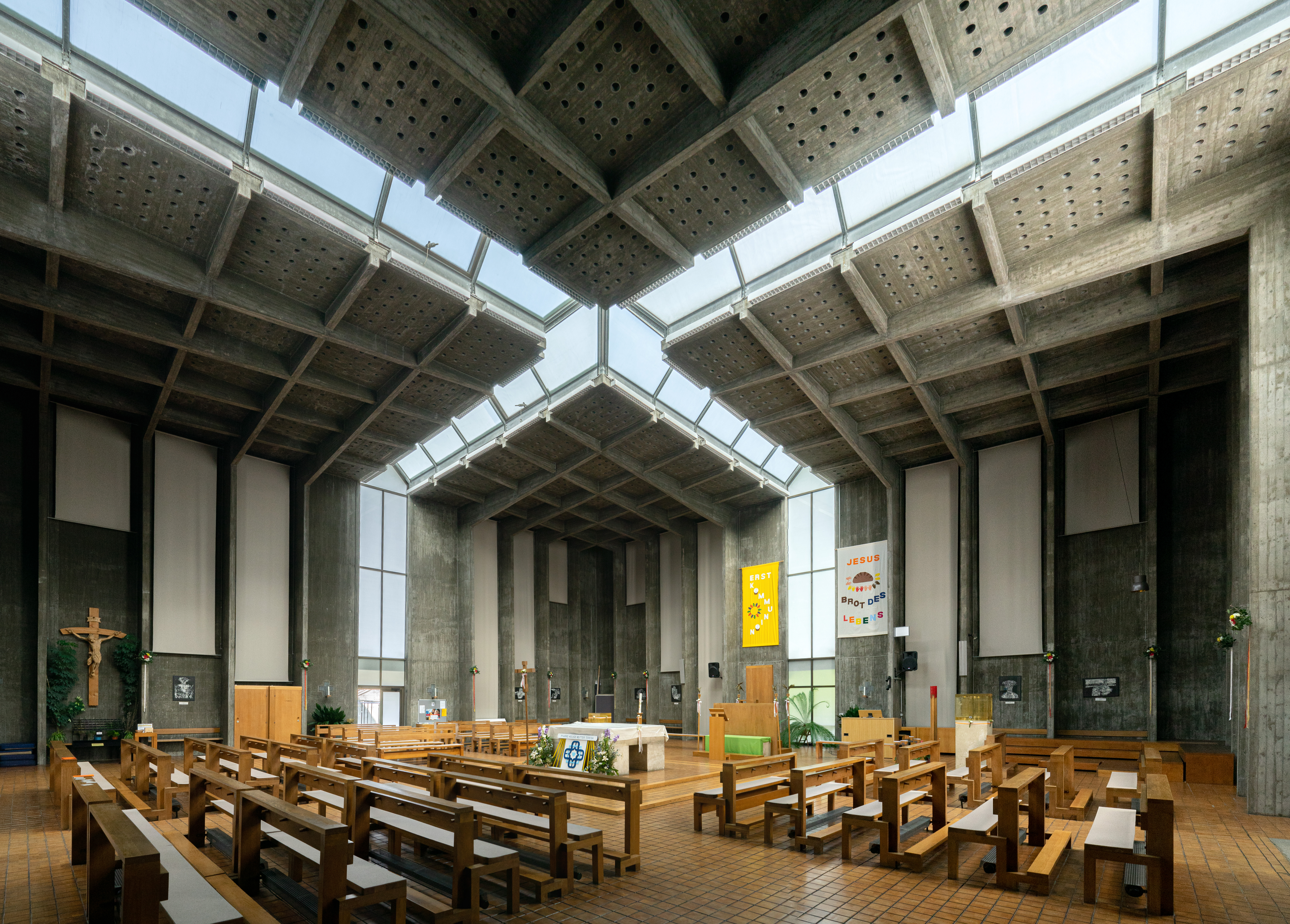 Pfarrkirche Oberbaumgarten